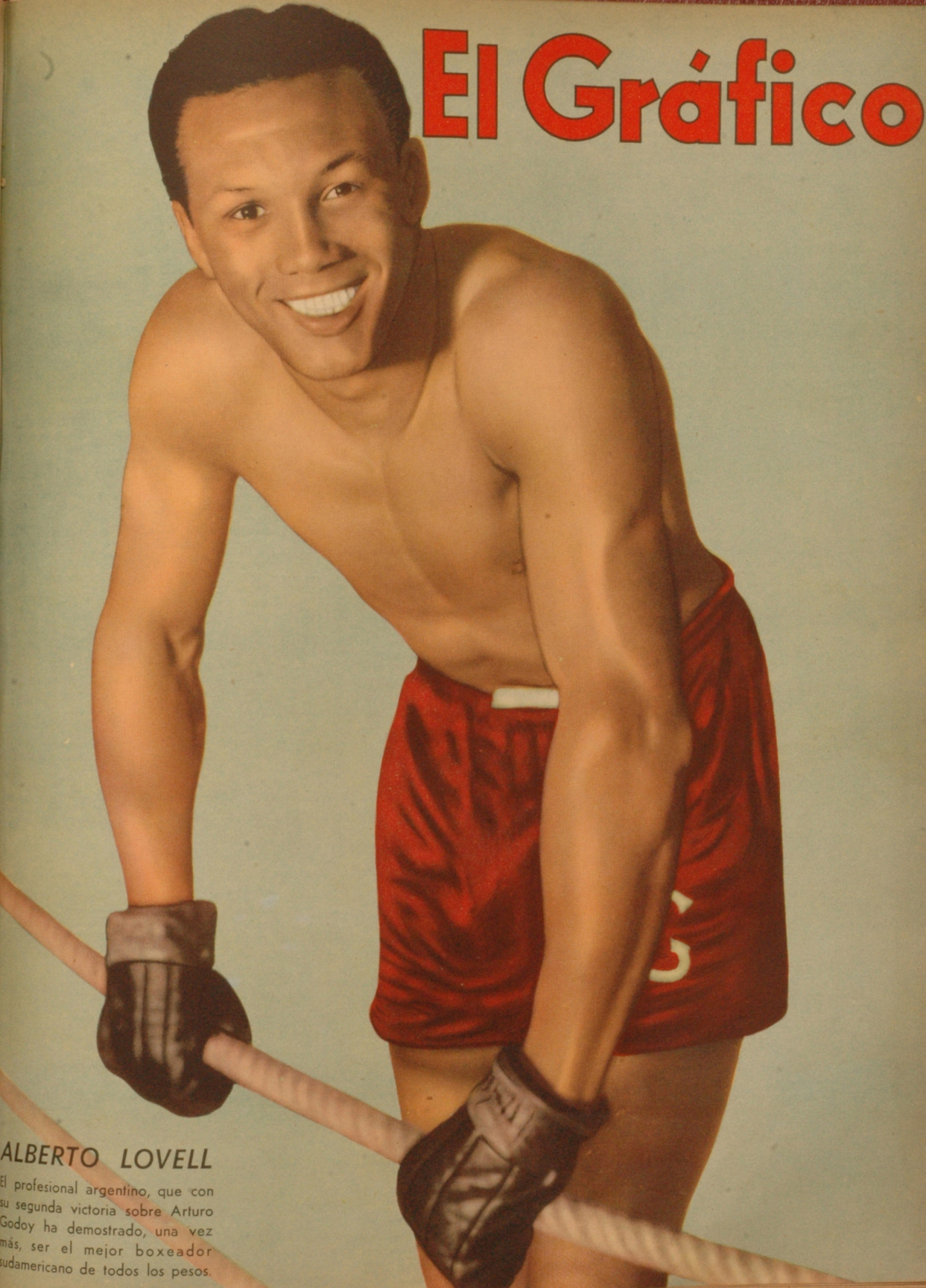 El Grafico del 30 de Mayo de 1941. Edicion 1142